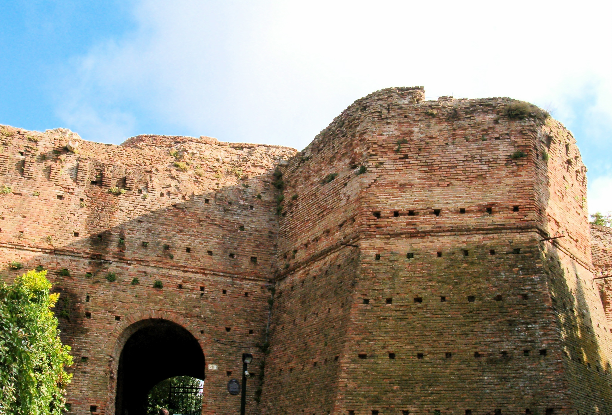 Rocca Malatestiana, Cesena